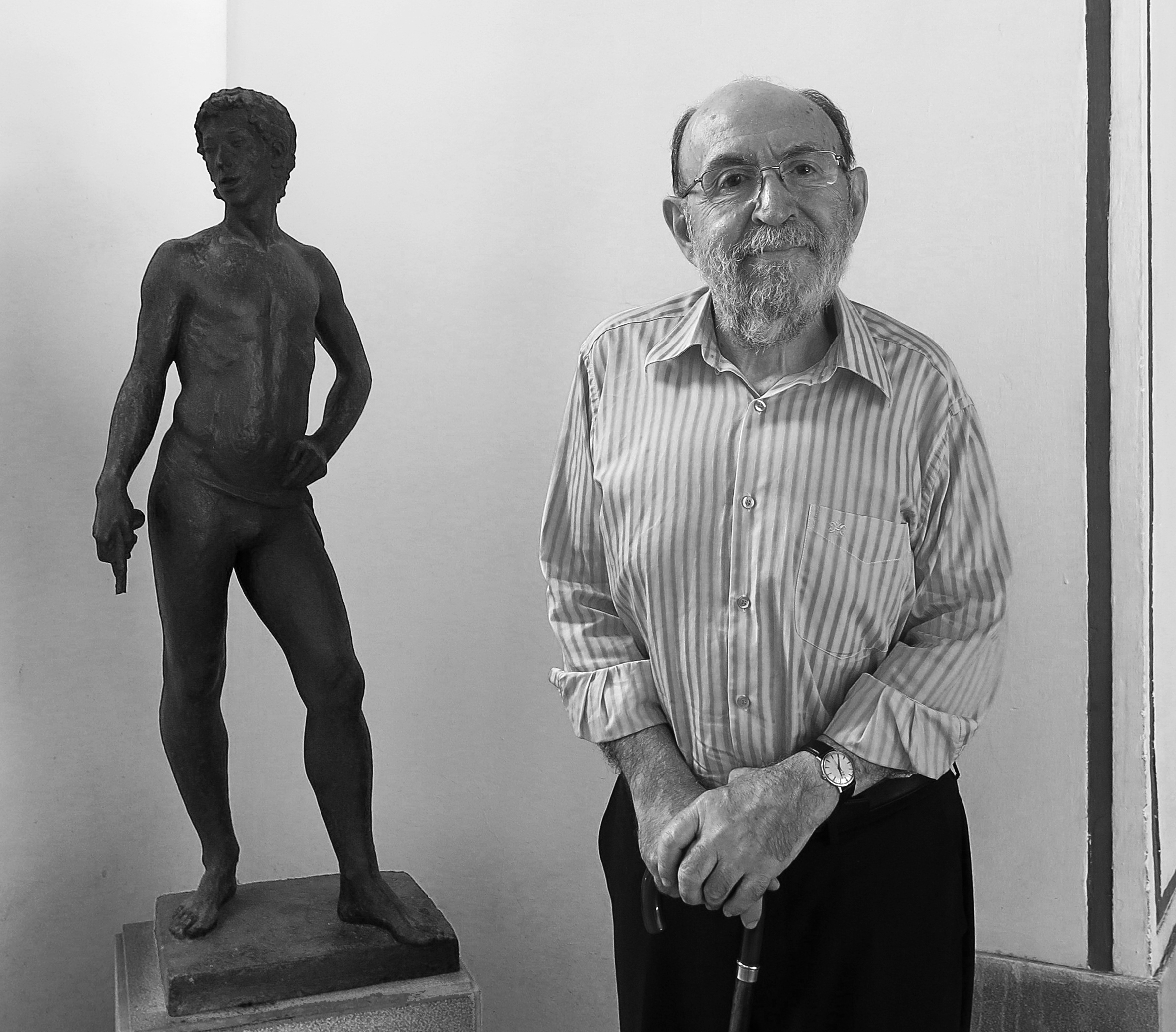 El poeta Marc Granell. València, maig de 2017.